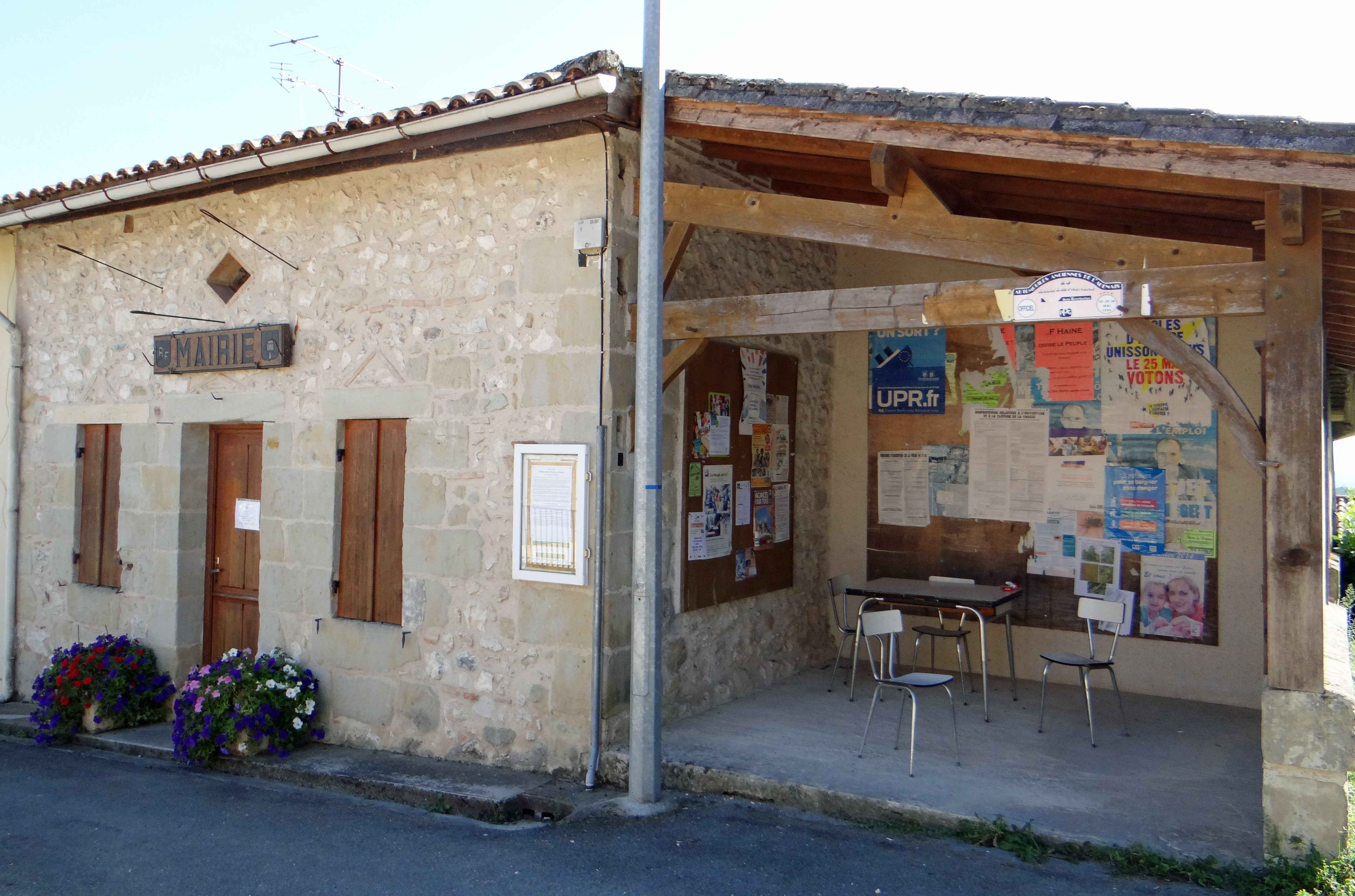 Tourtrès - Mairie